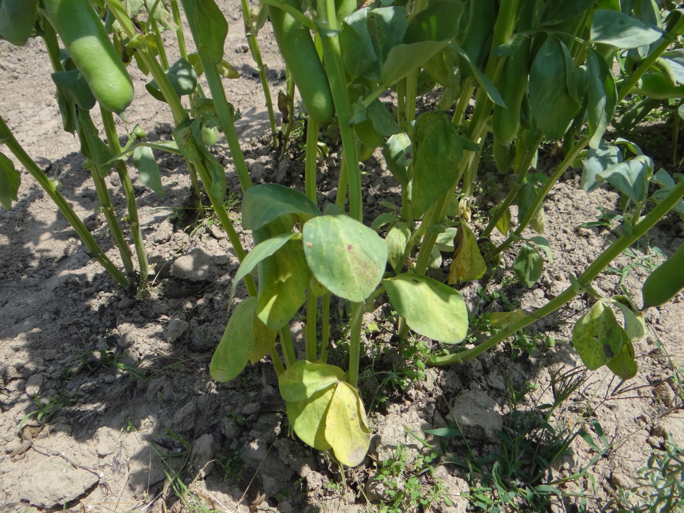 'Fusarium sp. on Vicia faba